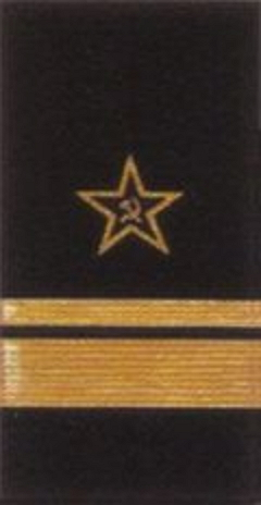 Знаки различия высшего ком. сост. флота до 1943 г., здесь нарукавные знаки различия «Кондр-aдмирала» (ОФ6).